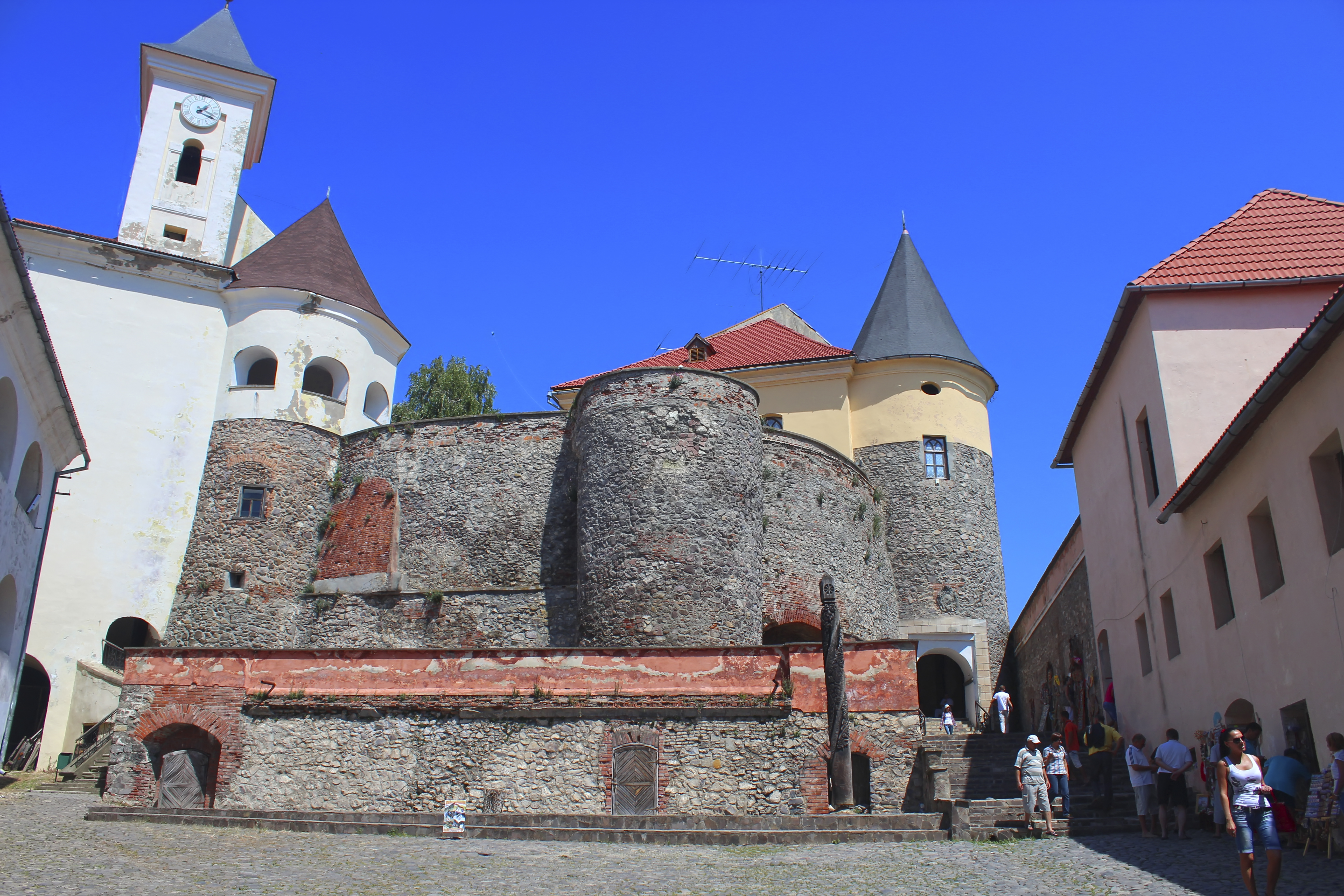 Замок "Паланок" (мур.), Мукачеве, Замкова гора